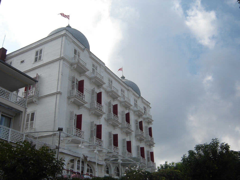 Splendid Palace Hotel in Büyükada, built in 1908